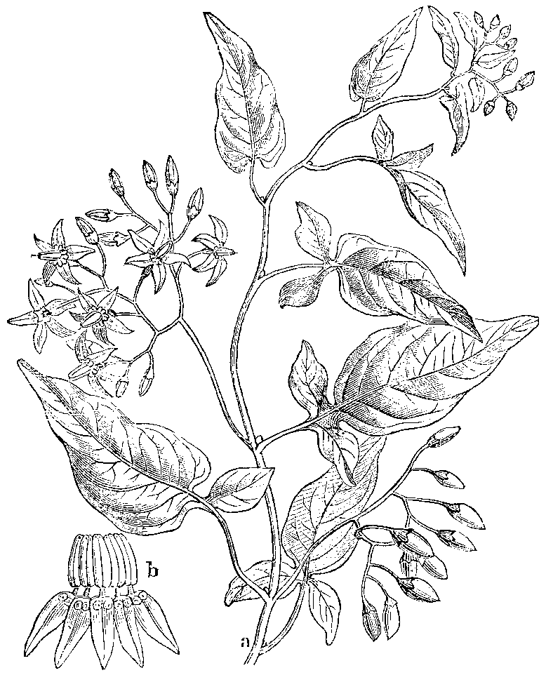 Slika 83. Grenkoslad. (Solánum Dulcamára.)